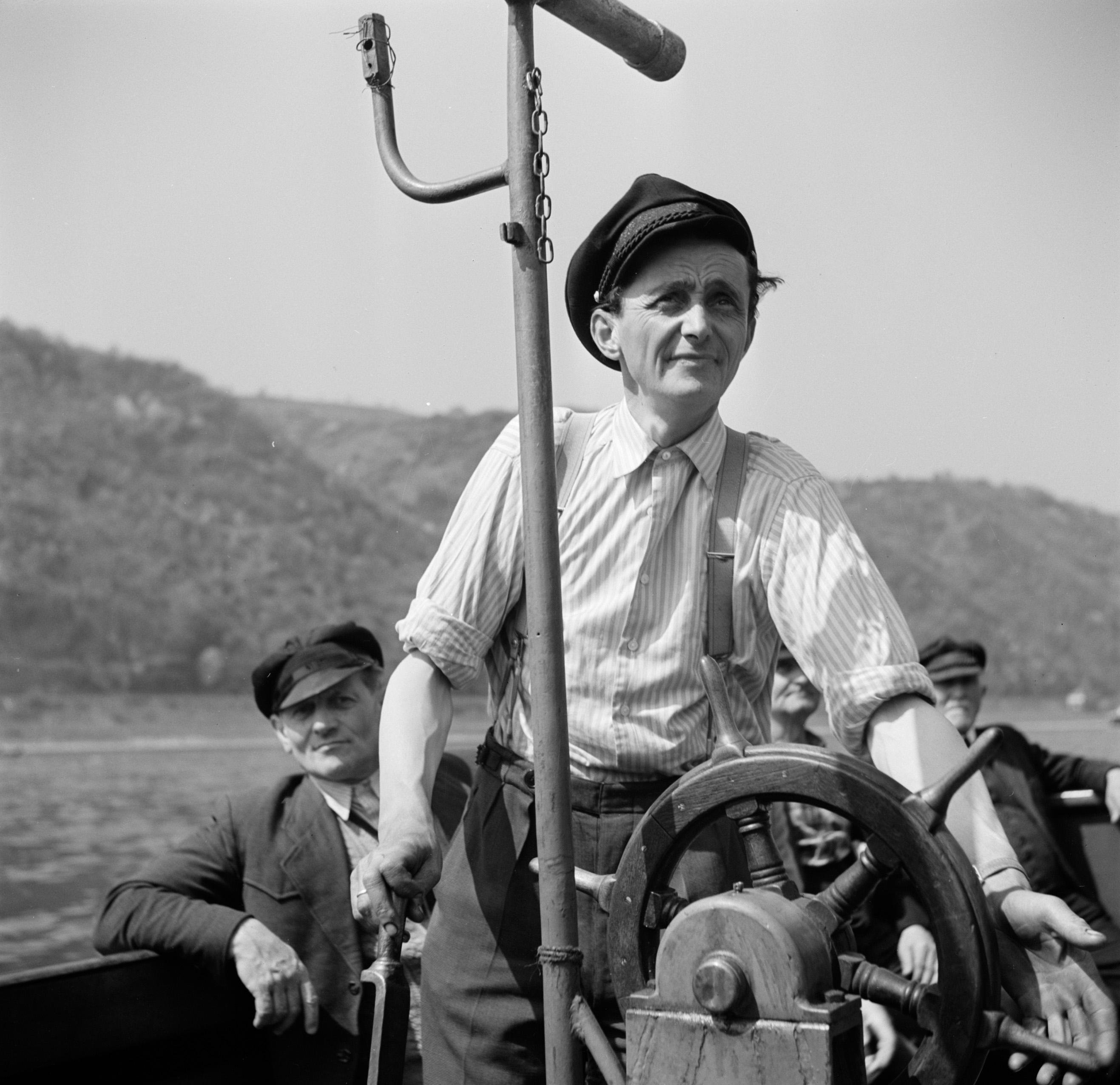 Collectie / Archief : Fotocollectie Van de Poll Reportage / Serie : Rijnvaart, reportage over het leven en werken aan boord van een Rijnschip Beschrijving : Loodsen in hun boot bij Kaub Datum : 1 april 1955 Locatie : Duitsland, Kaub, West-Duitsland Trefwoorden : heuvels, loodsboten, loodswezen Fotograaf : Poll, Willem van de Auteursrechthebbende : Nationaal Archief Materiaalsoort : Negatief (6x6) Nummer archiefinventaris : bekijk toegang 2.24.14.02 Bestanddeelnummer : 254-1573